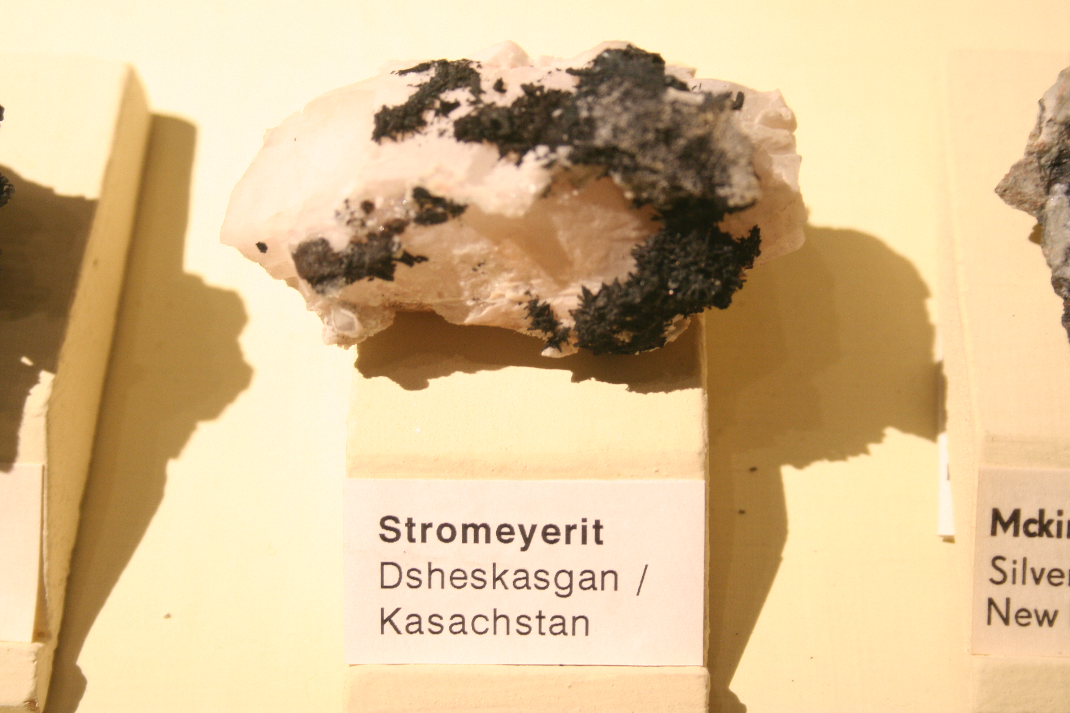 Stromeyerit im Museum für Naturkunde Berlin Fundort:Dshekasgan in Kasachstan